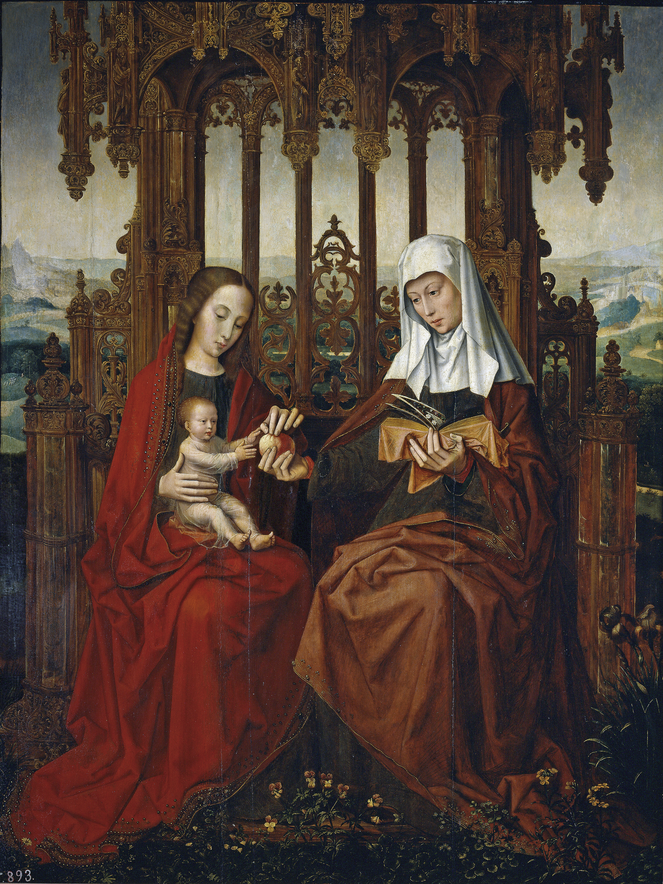 La obra representa a la Virgen María llevando al Niño Jesús y acompañada por su madre, Santa Ana.